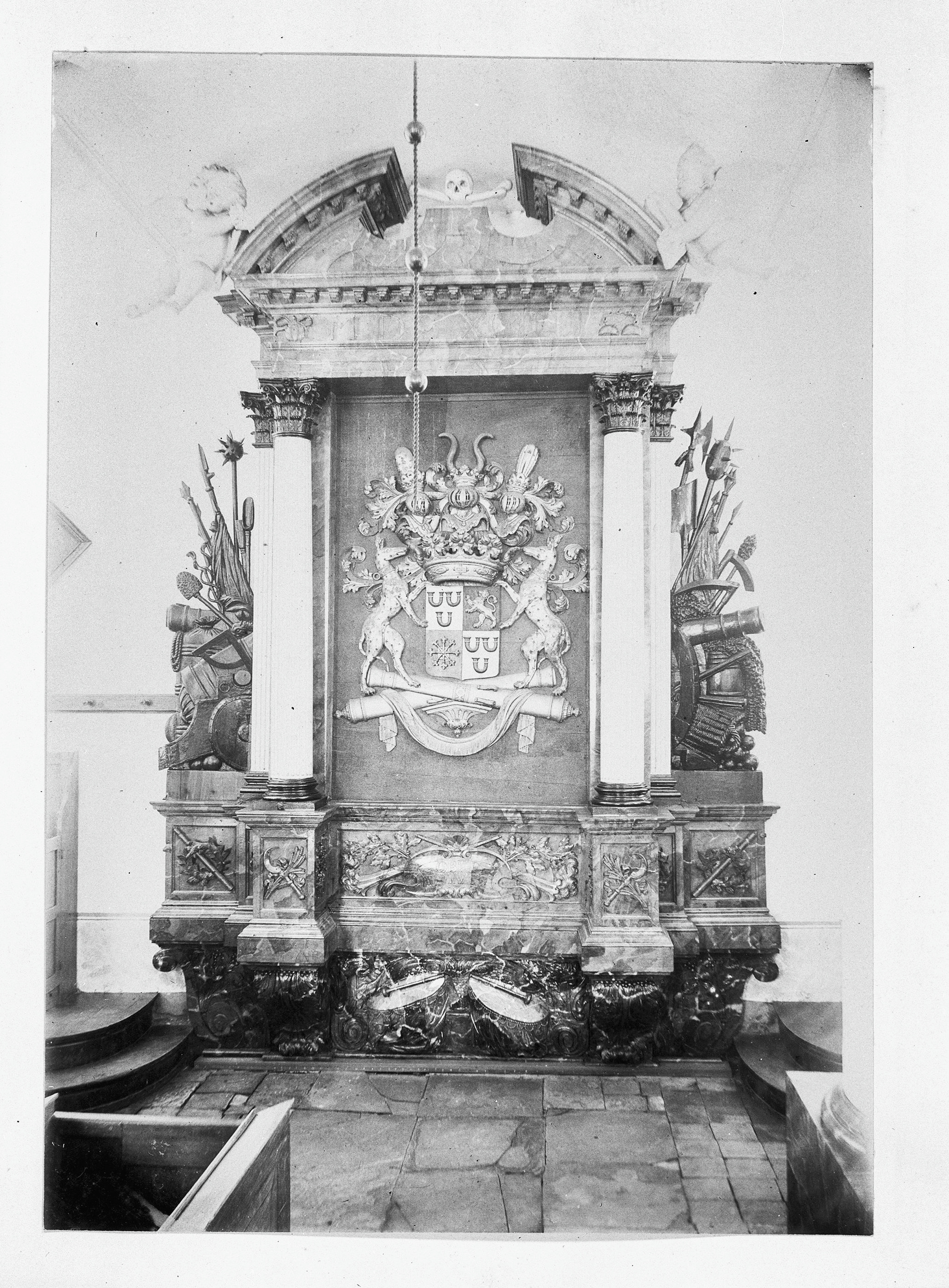 N.H.Kerk: monument van Graaf Willem Adriaan plaat no. 47